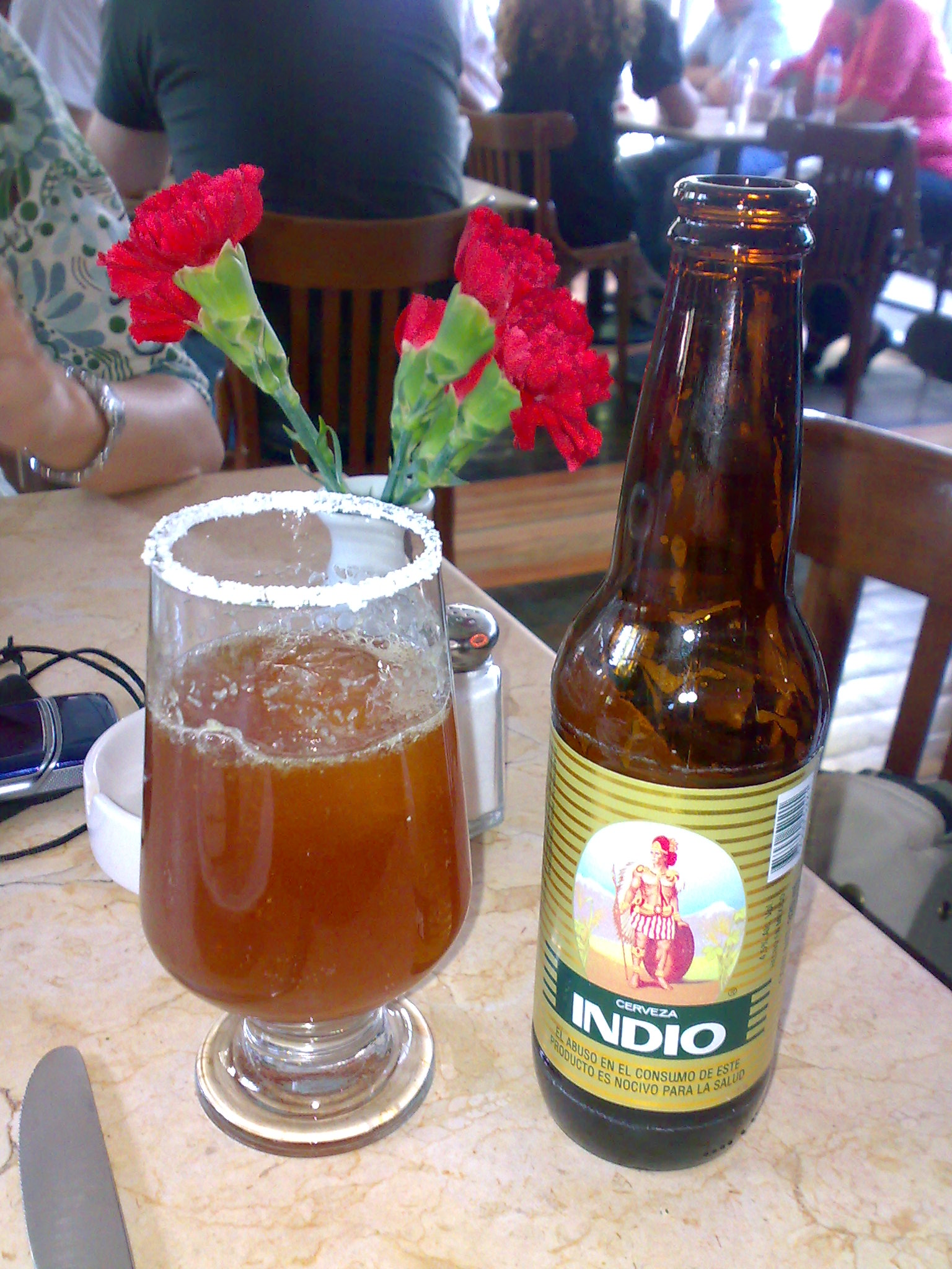 Botella de la cerveza Indio, preparado como Michelada en un vaso.